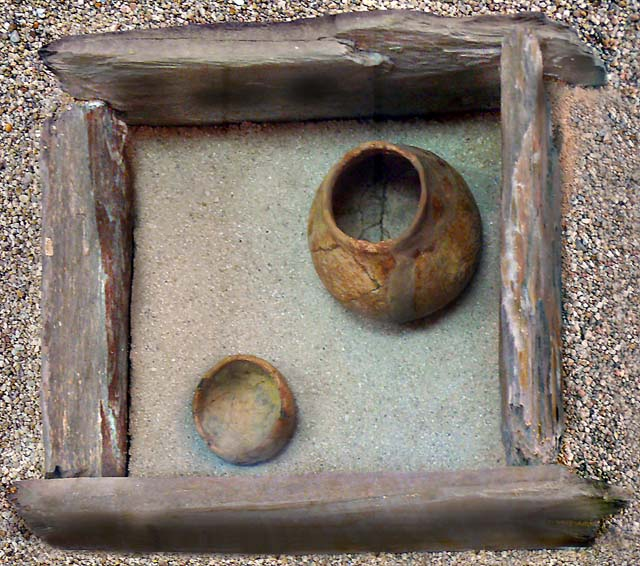 Cista, reconstrucción museística